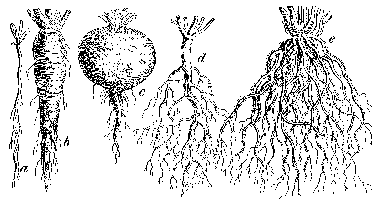 Slika 1: Navadne oblike korenin.